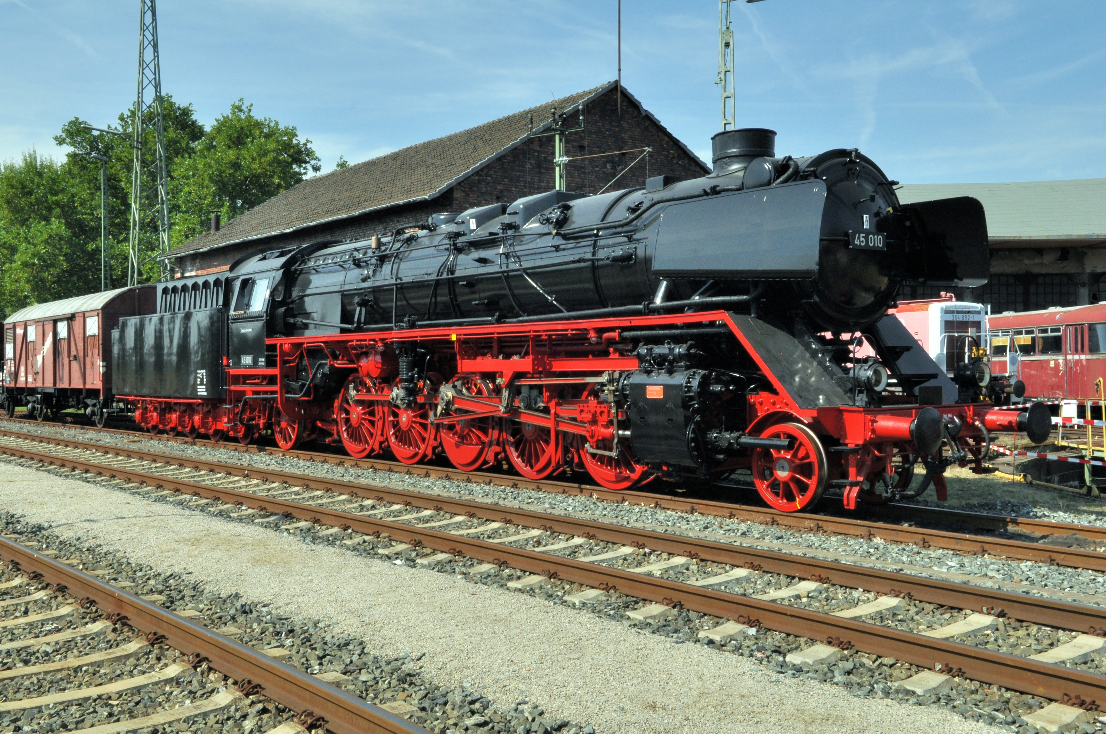 DB-Museumslok 45 010 in der Außenstelle Lichtenfels